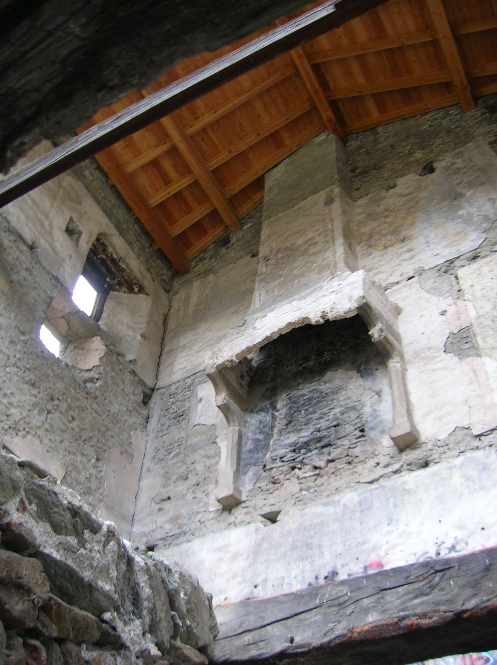 Resti di camino. Castello La Mothe, Arvier, Valle d'Aosta, Italia.